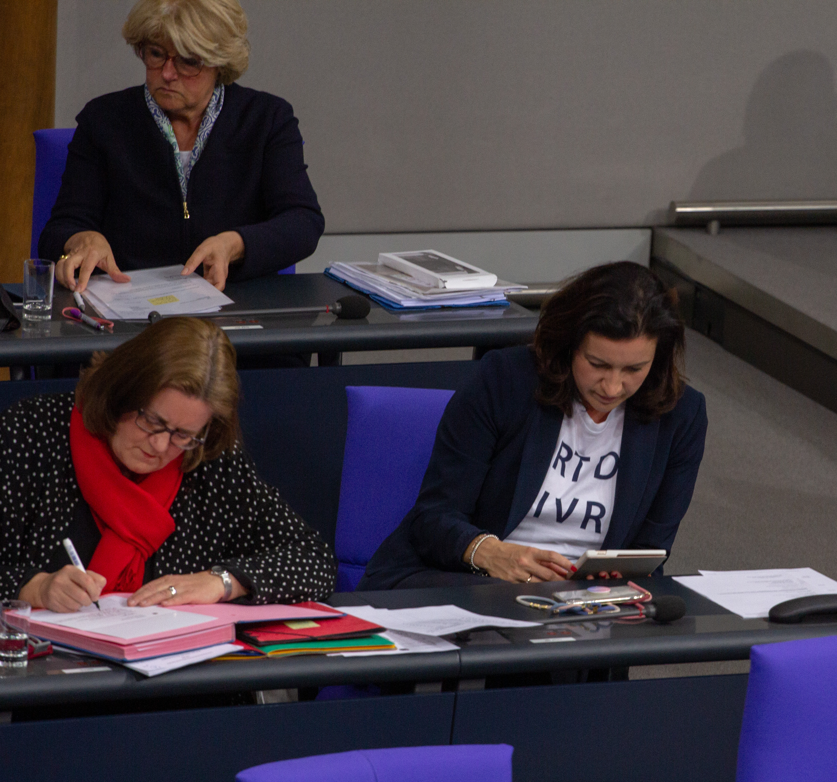 Regierungsbankim Plenum des Deutschen Bundesatges am 11. April 2019 in Berlin.